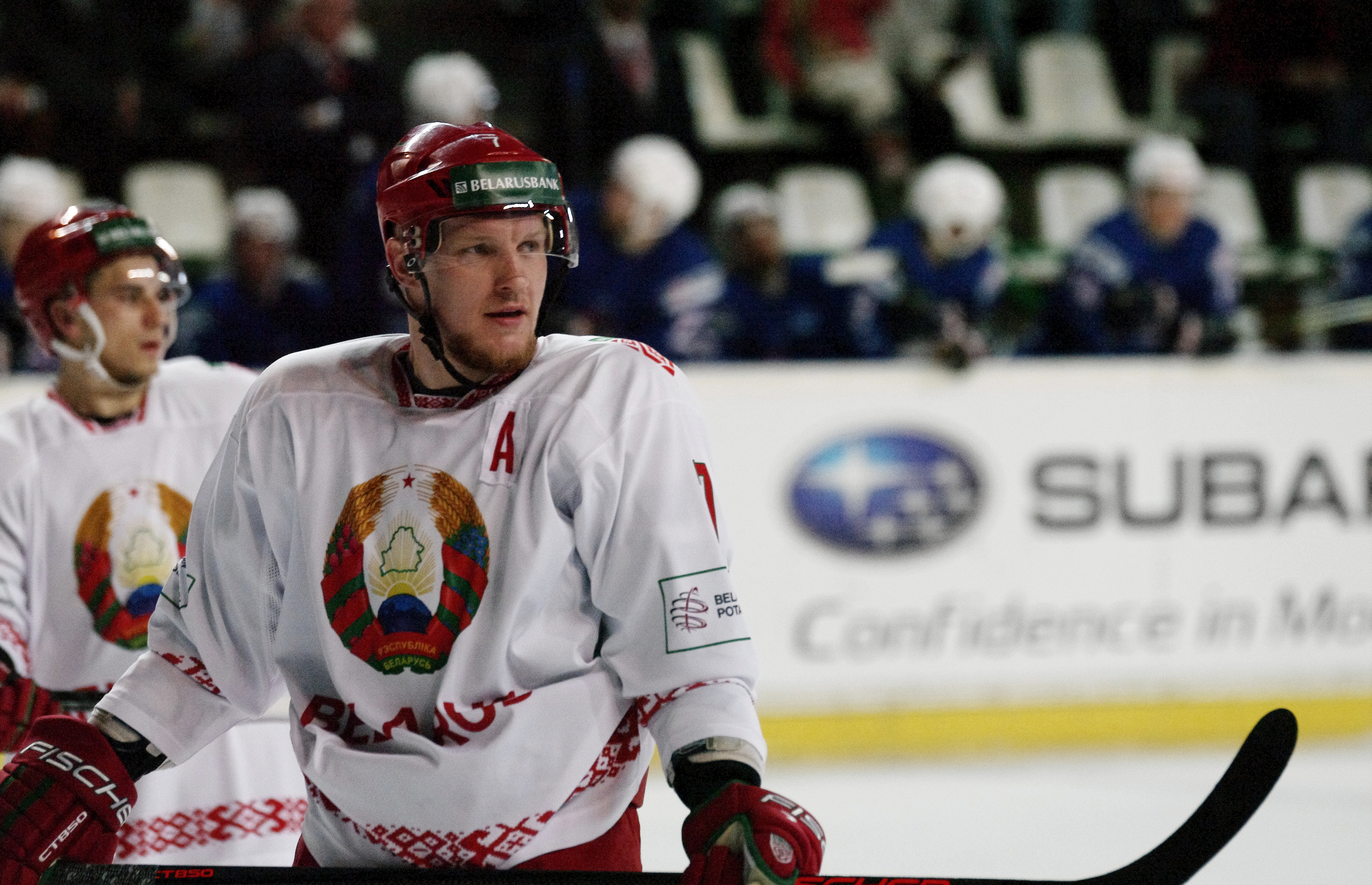 France vs. Biélorussie, 1er mai 2017